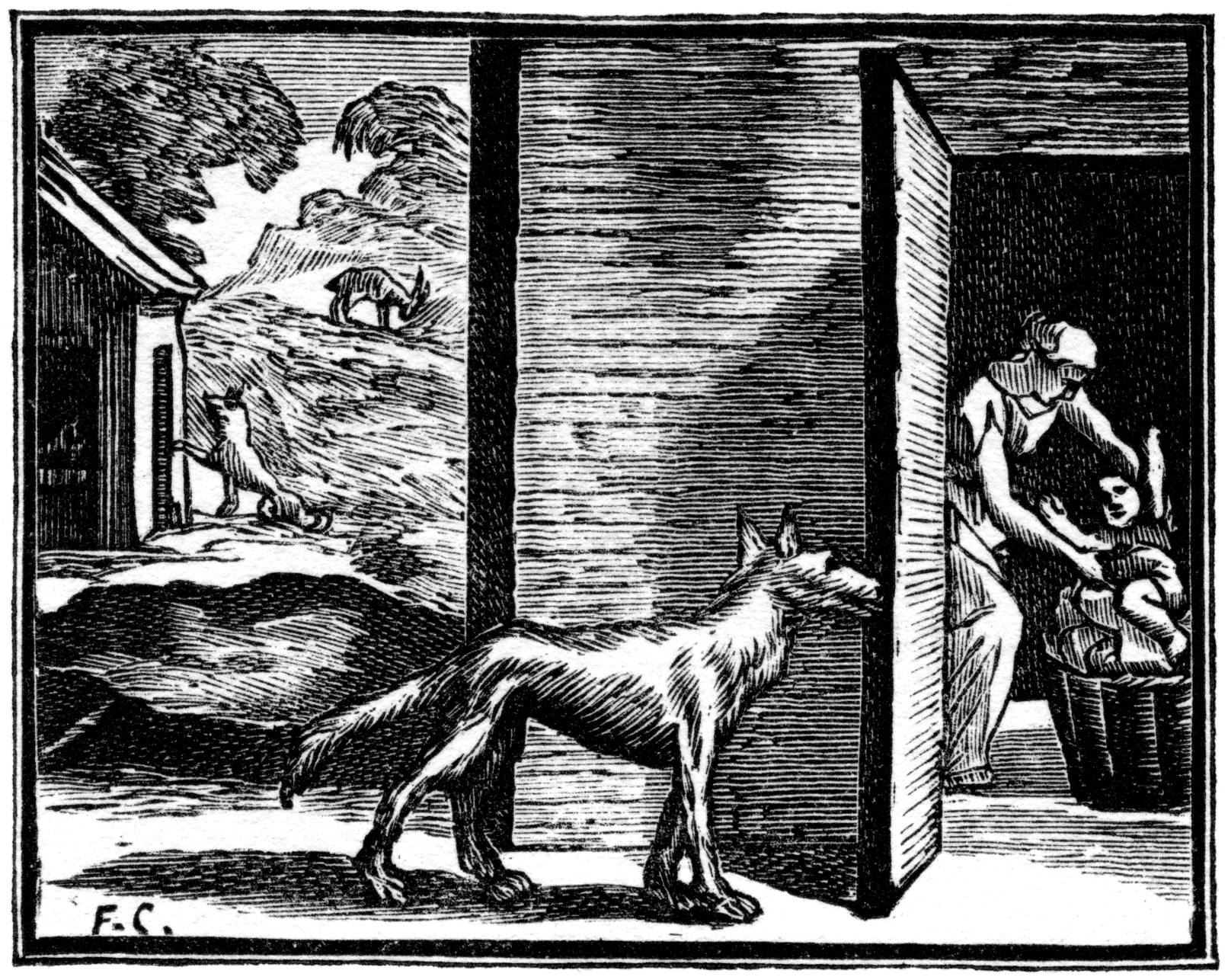 Illustrations pour les « Fables choisies mises en vers par M. de la Fontaine », Claude Barbin et Denys Thierry, Paris, 1668 (premier recueil) 1678-79 (deuxième recueil) 1694 (troisième recueil). Numérotation Charpentier (1705).